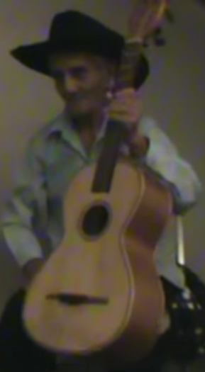 Viro kun Golpa gitaro (Guitarra de golpe).